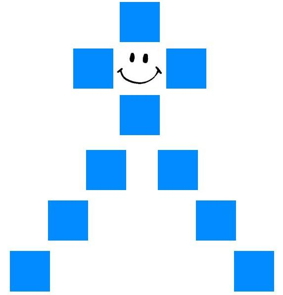 Het Rekenmannetje is een didactiek om het optellen en aftrekken te leren aan leerlingen basisonderwijs.